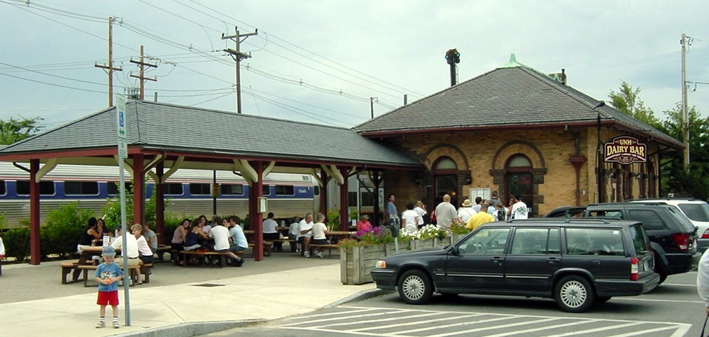 Amtrak Station and Dairy Bar Durham, NH